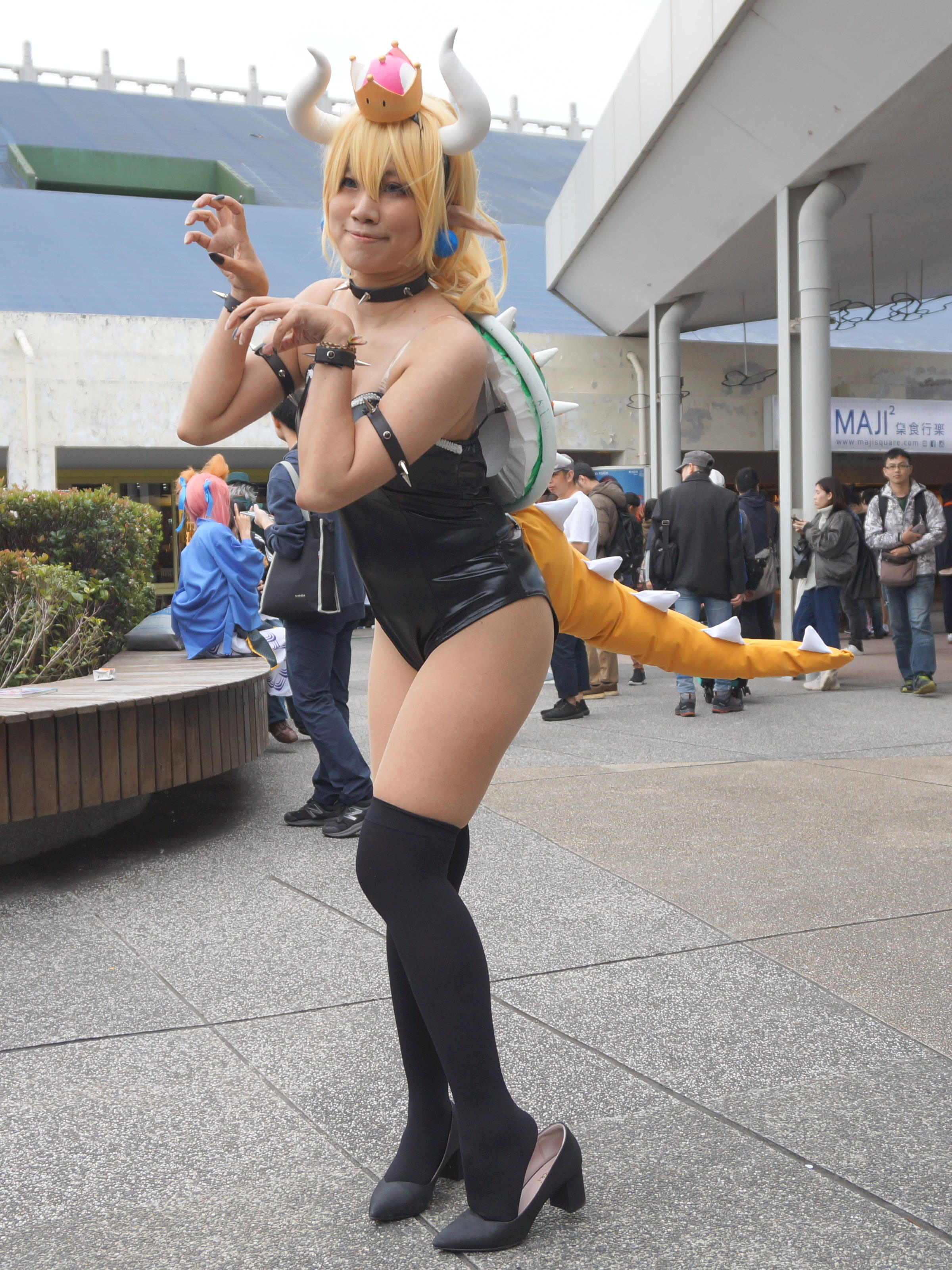 第33屆開拓動漫祭，庫巴姬cosplayer。